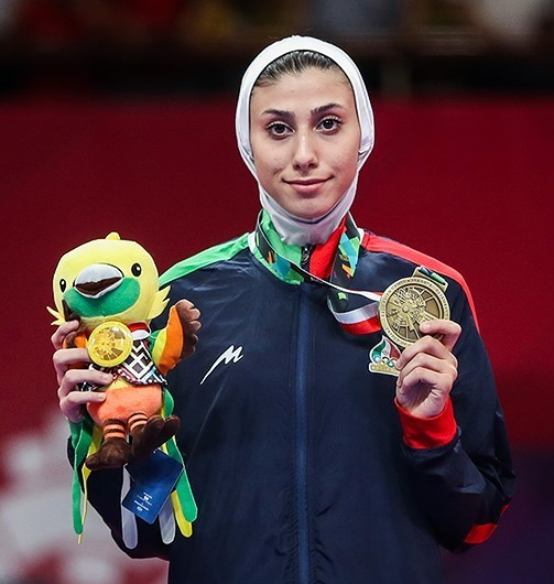 ناهید کیانی در مسابقات تکواندو بازی‌های آسیایی ۲۰۱۸